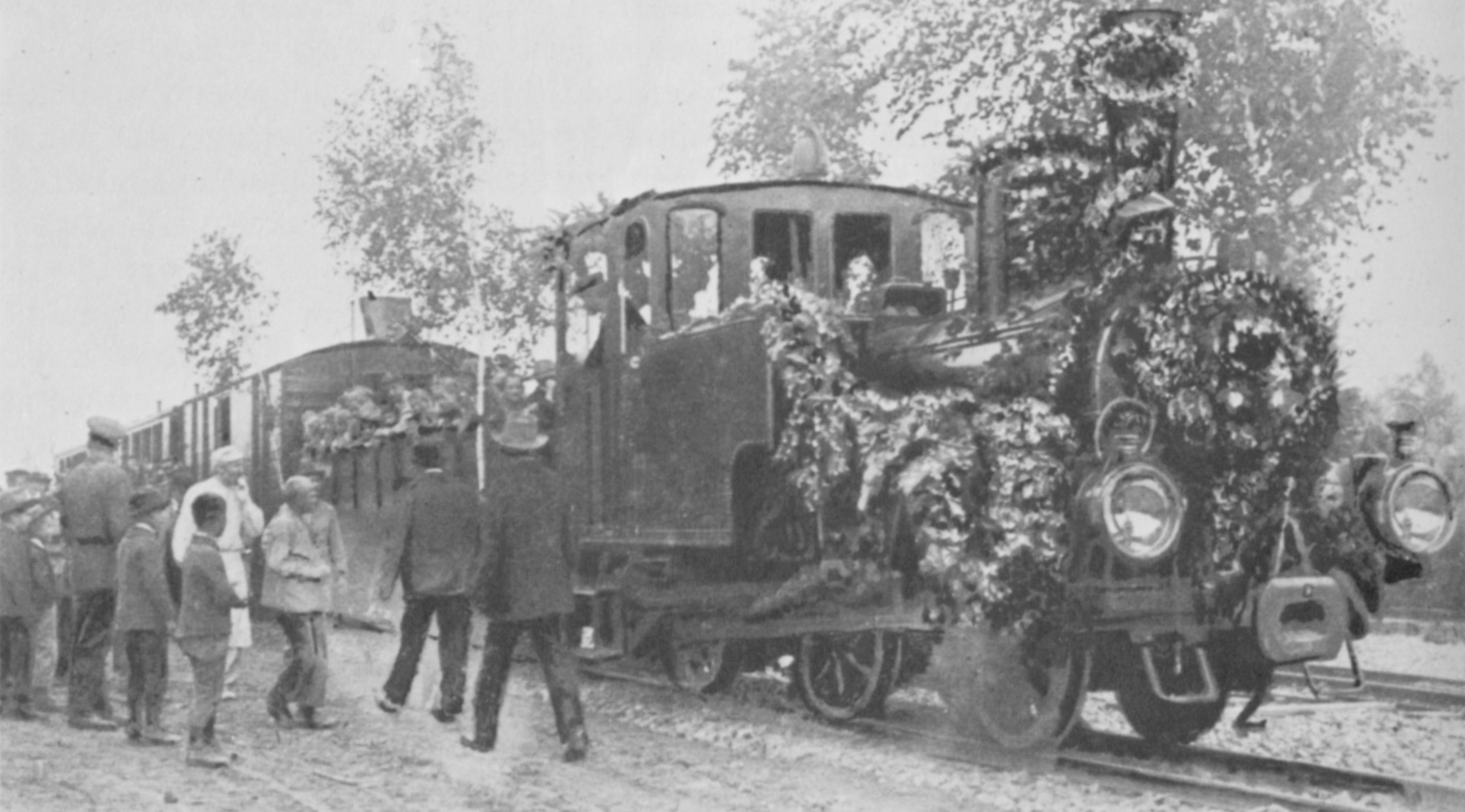 Dampflokomotive Württembergische Tss3. Eröffnung der Zabergäubahn in Brackenheim.